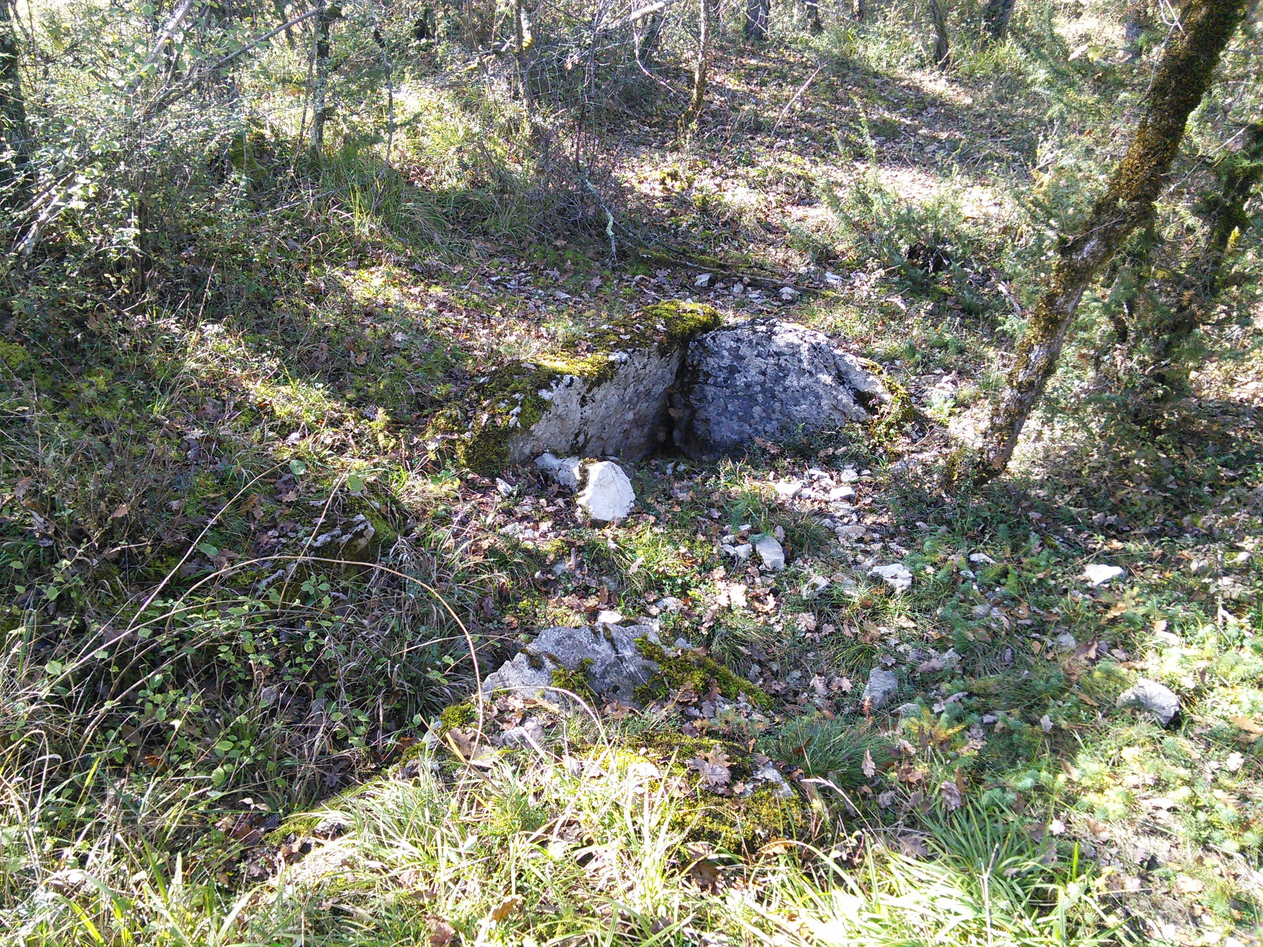 a